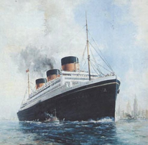 Непостроенный лайнер Уайт Стар Лайн "Океаник"